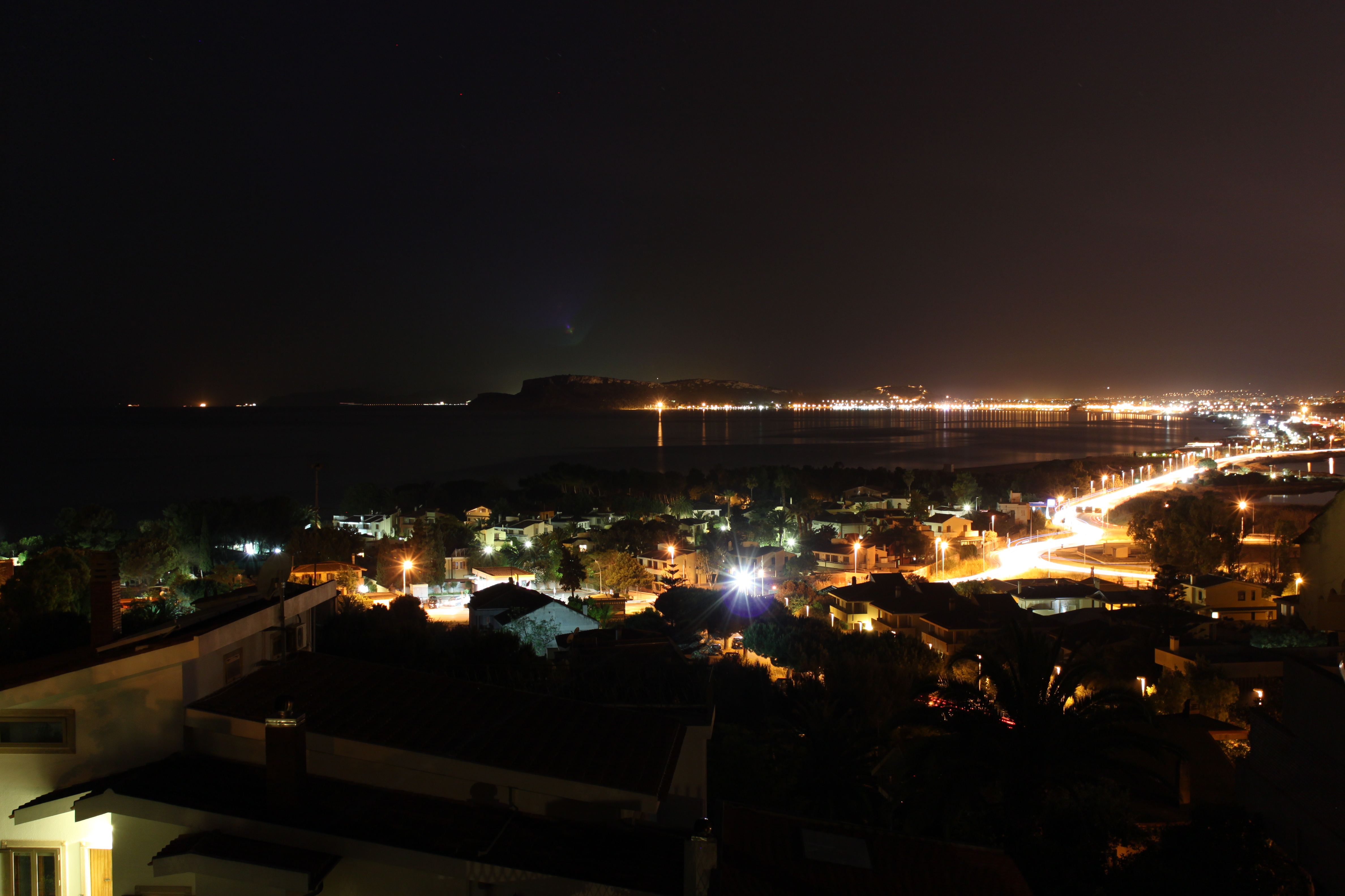 Veduta notturna del lungomare Poetto, Cagliari.